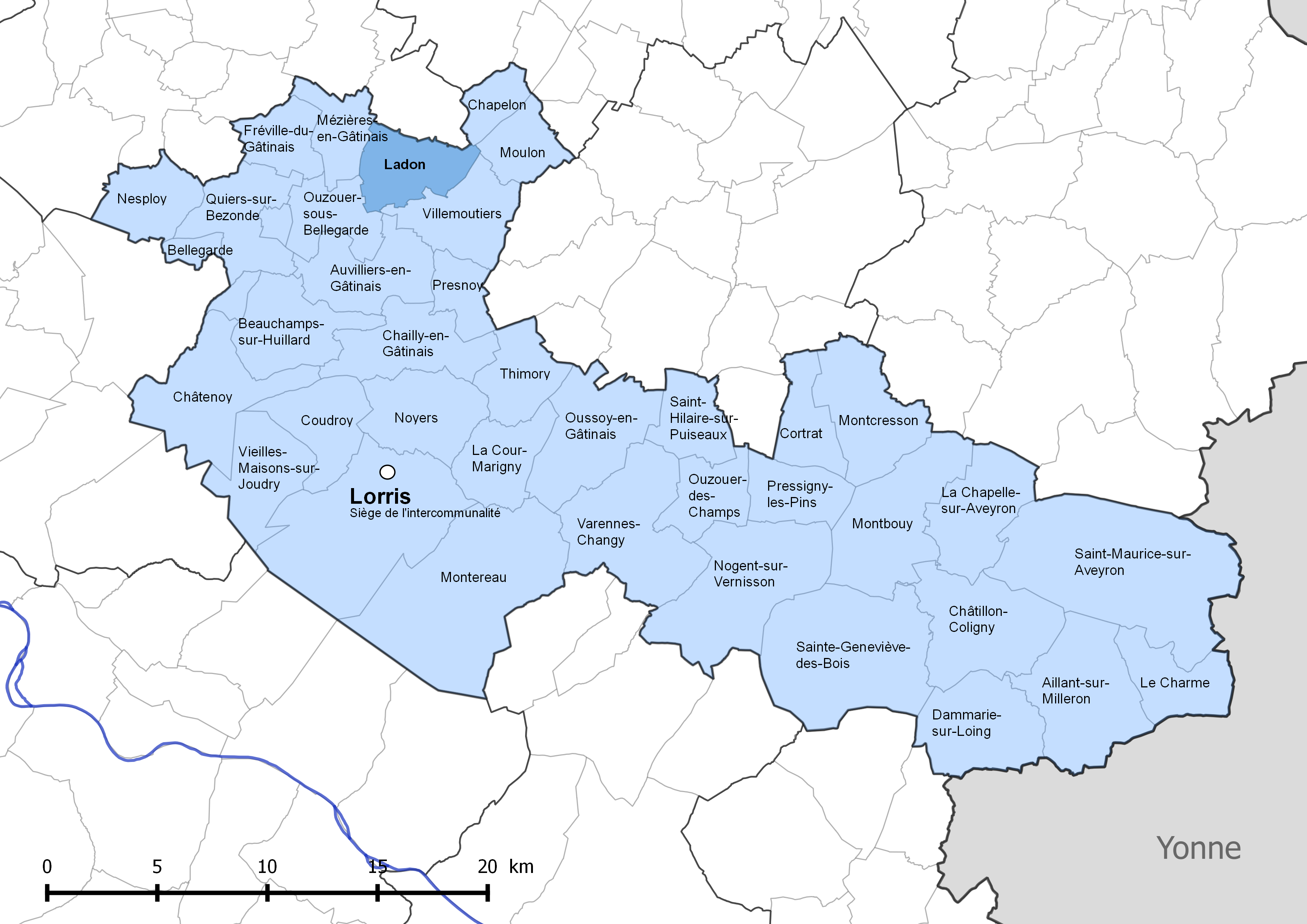 Périmètre de la communauté de communes Canaux et forêts en Gâtinais - Situation de la commune de Ladon (Loiret).